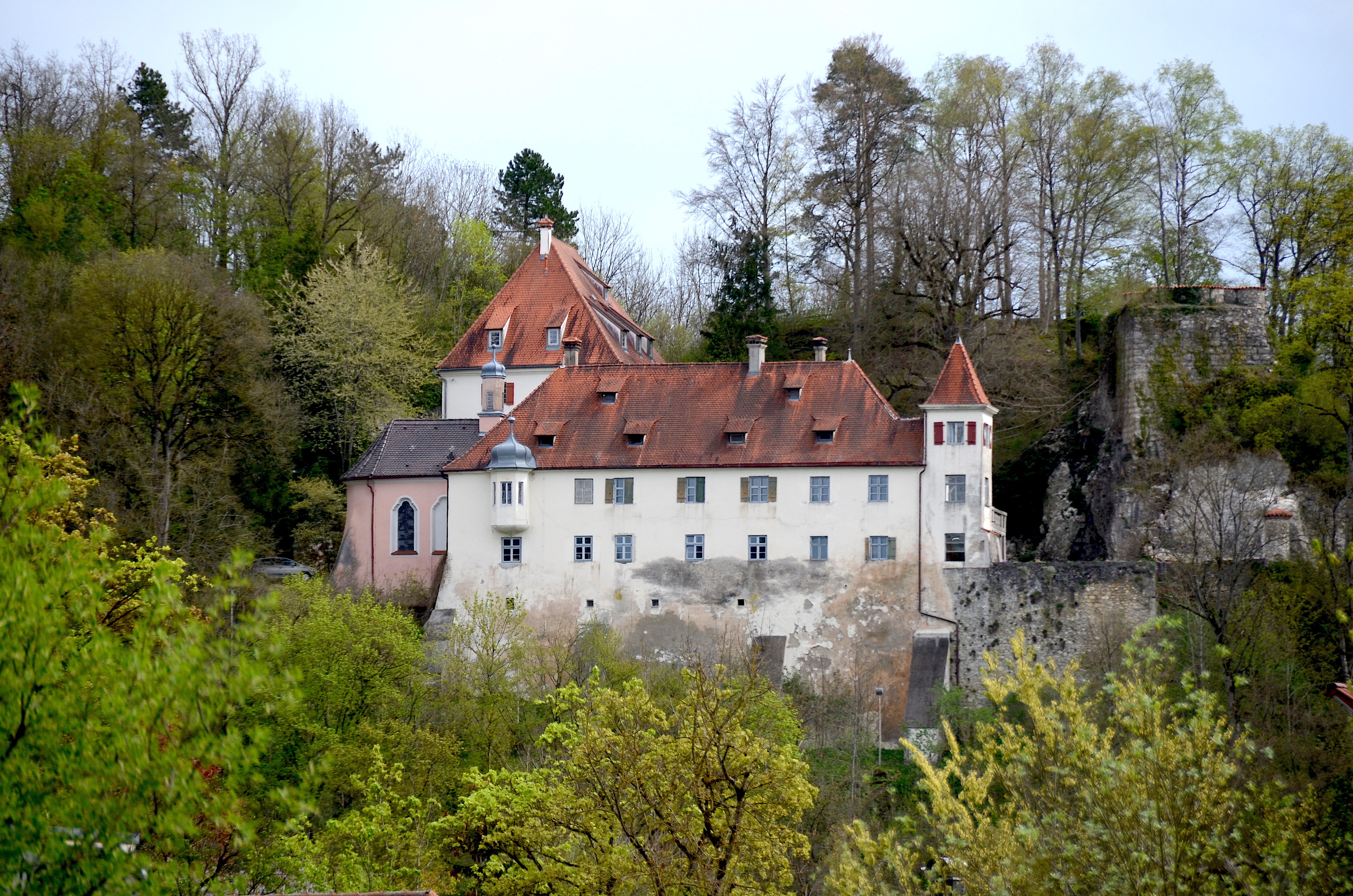 Schloss Klingenstein bei Blaustein im Blautal (Alb-Donau-Kreis)